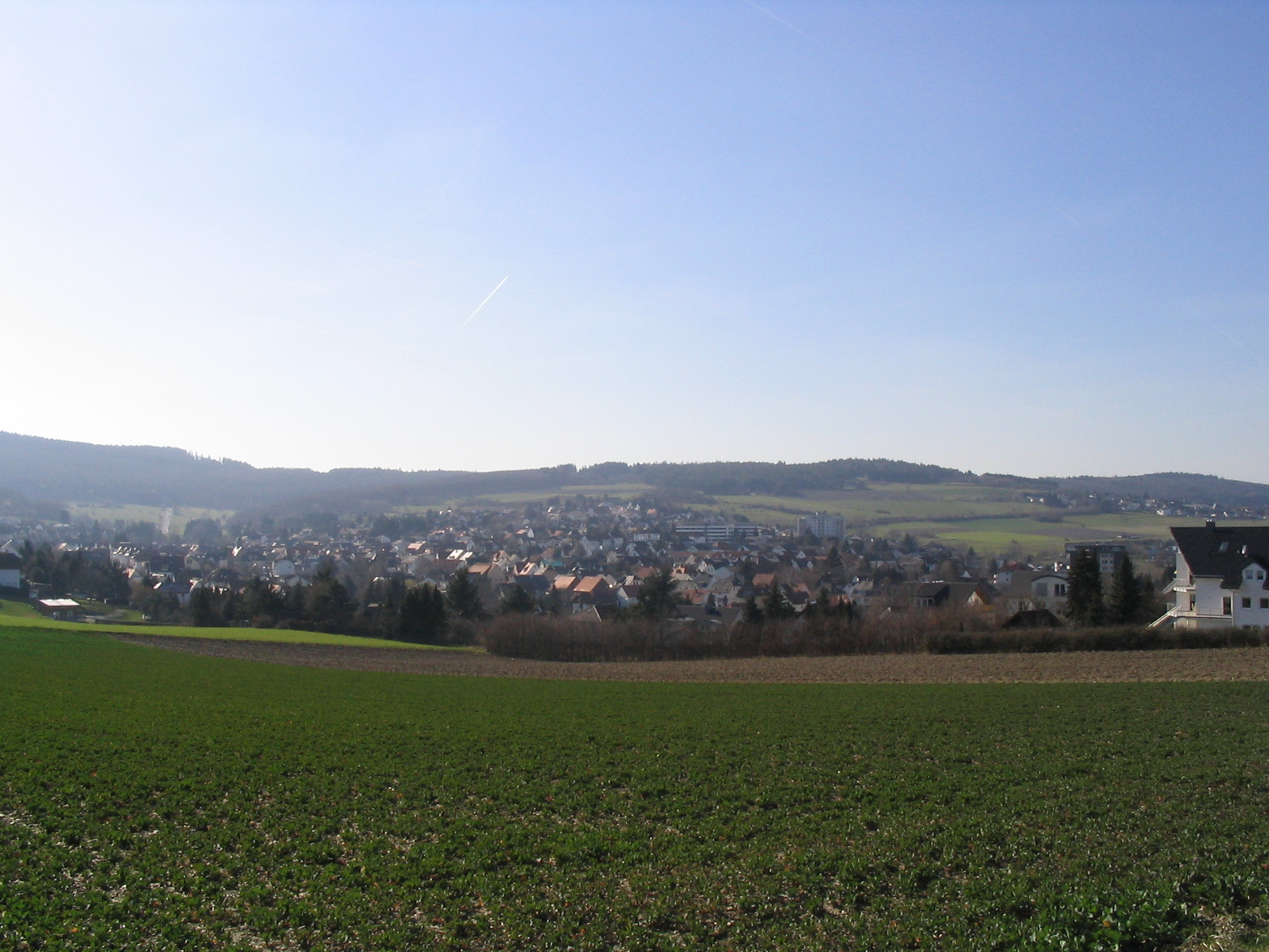 Blick über südlichen Teil des alten Ortskerns von Anspach